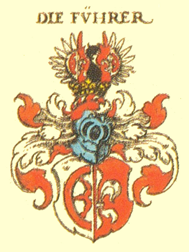 Wappen der Nürnberger Patrizierfamilie Fürer von Haimendorf